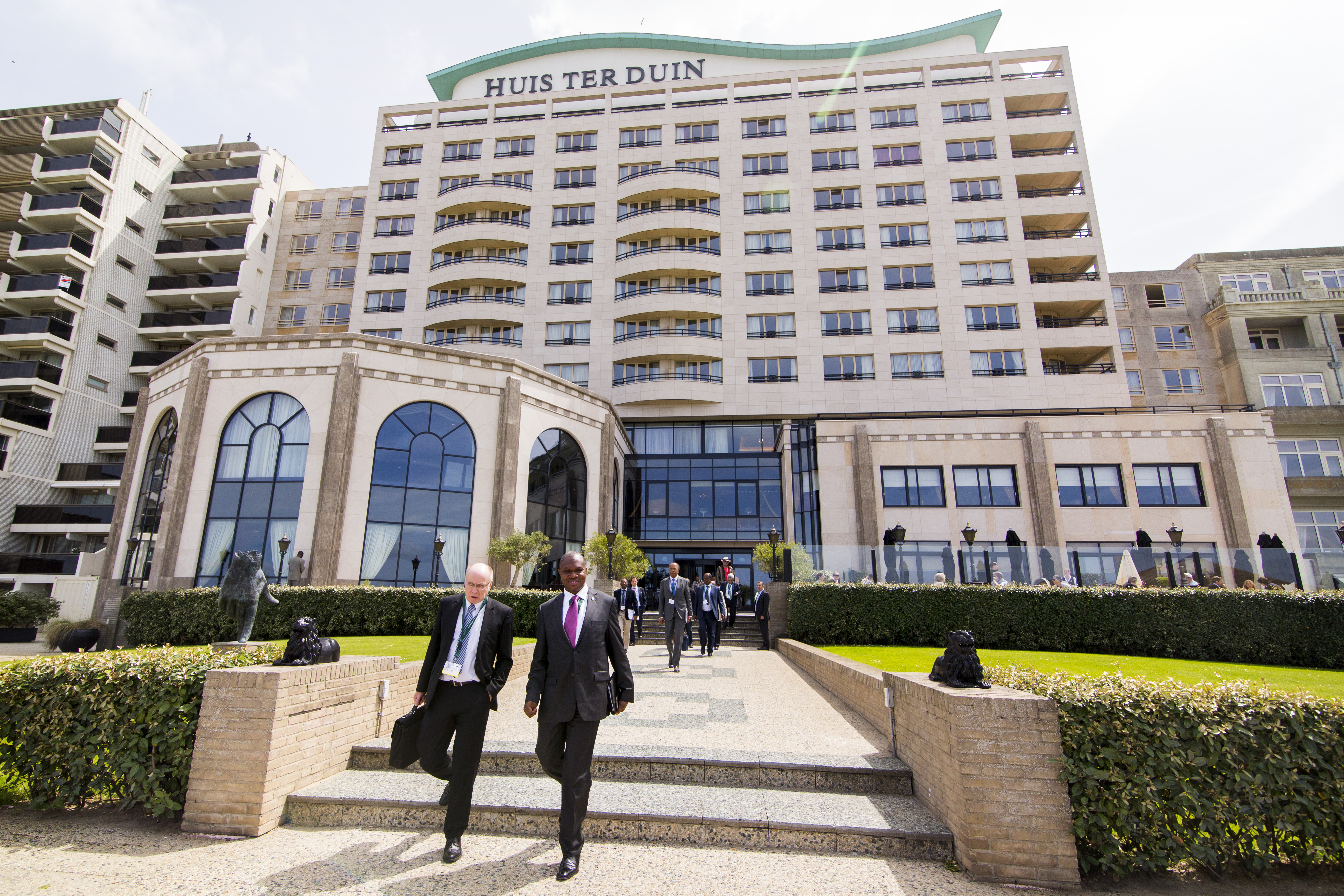 Noordwijk, 5 juli 2016. AU-EU bijeenkomst in Huis ter Duin in Noordwijk.